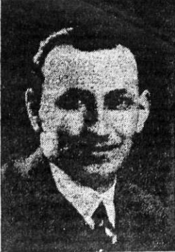 Periodista tradicionalista